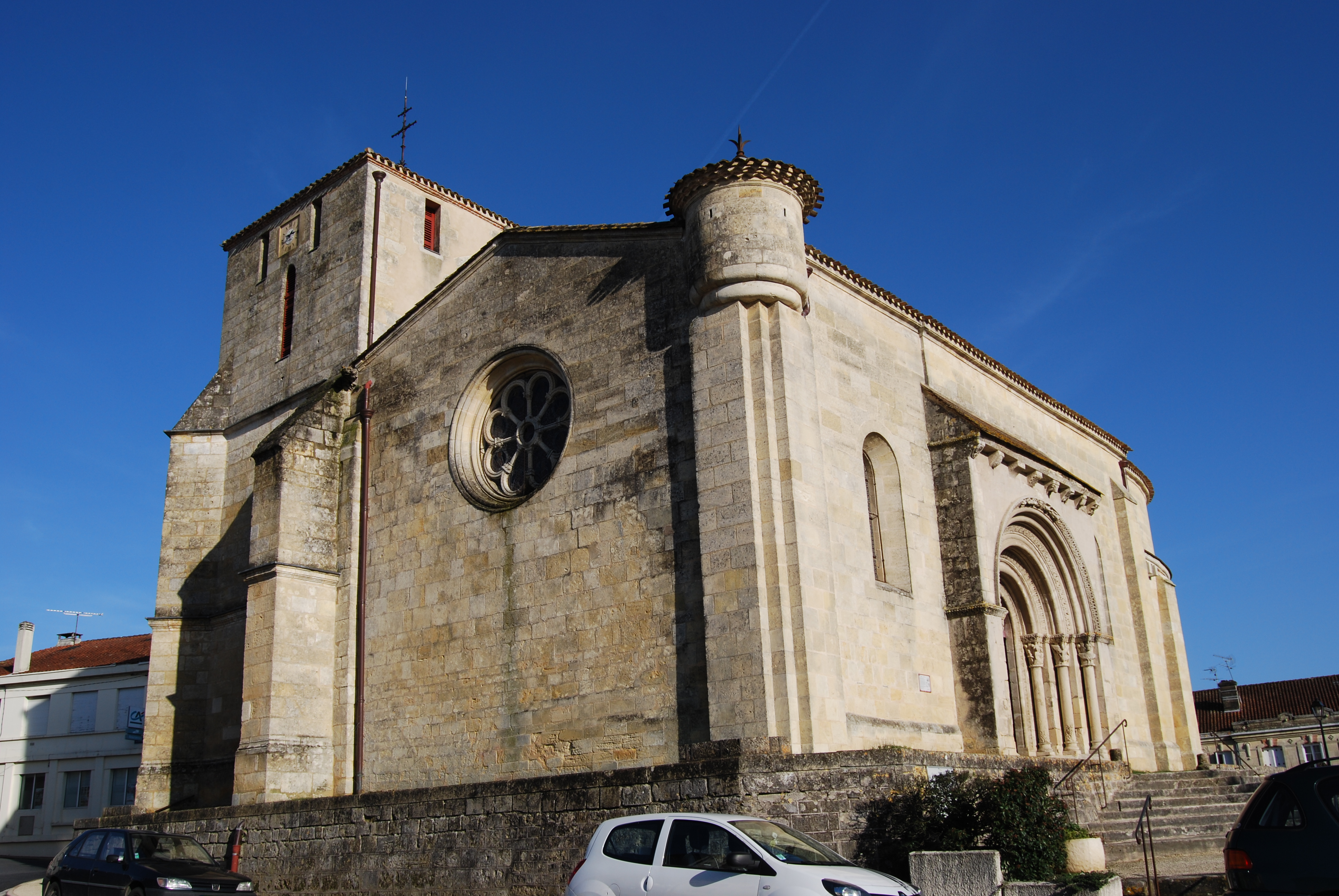 Église Saint-Romain de Targon, (Inscrit, 1925)